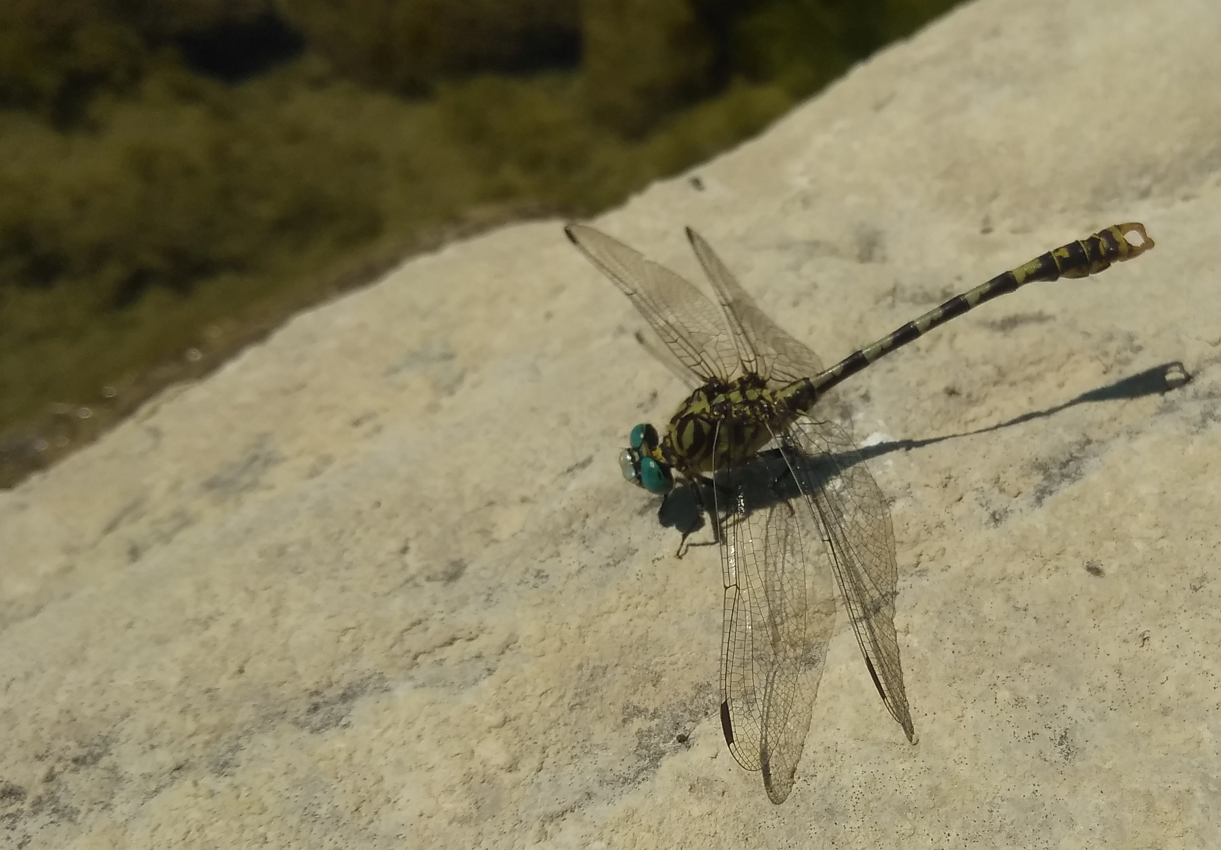 Monte Grammondo - Torrente Bevera (Q47502132)